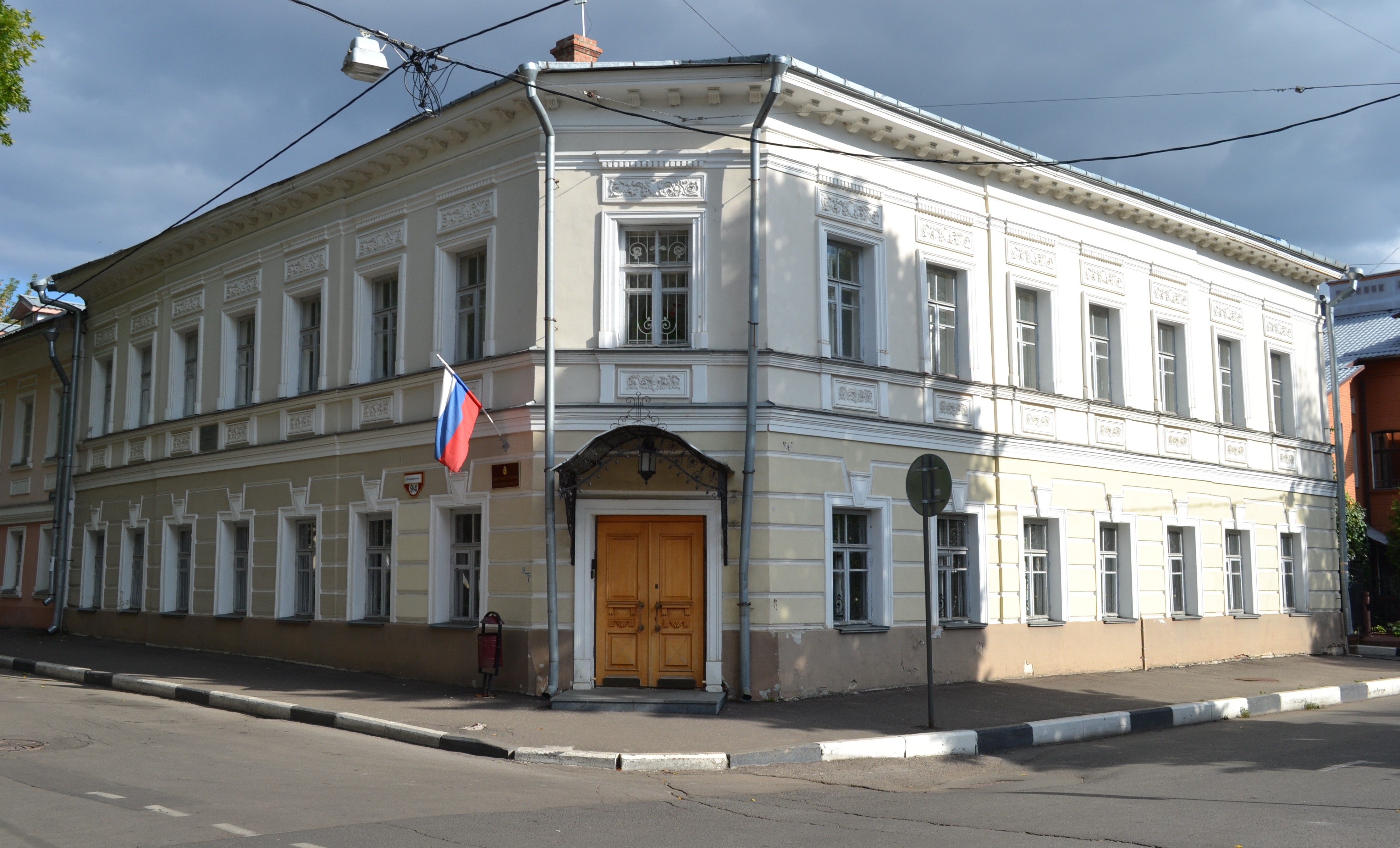 Дом Смолина (Ярославская область, Ярославль, Революционная улица, 9/4)